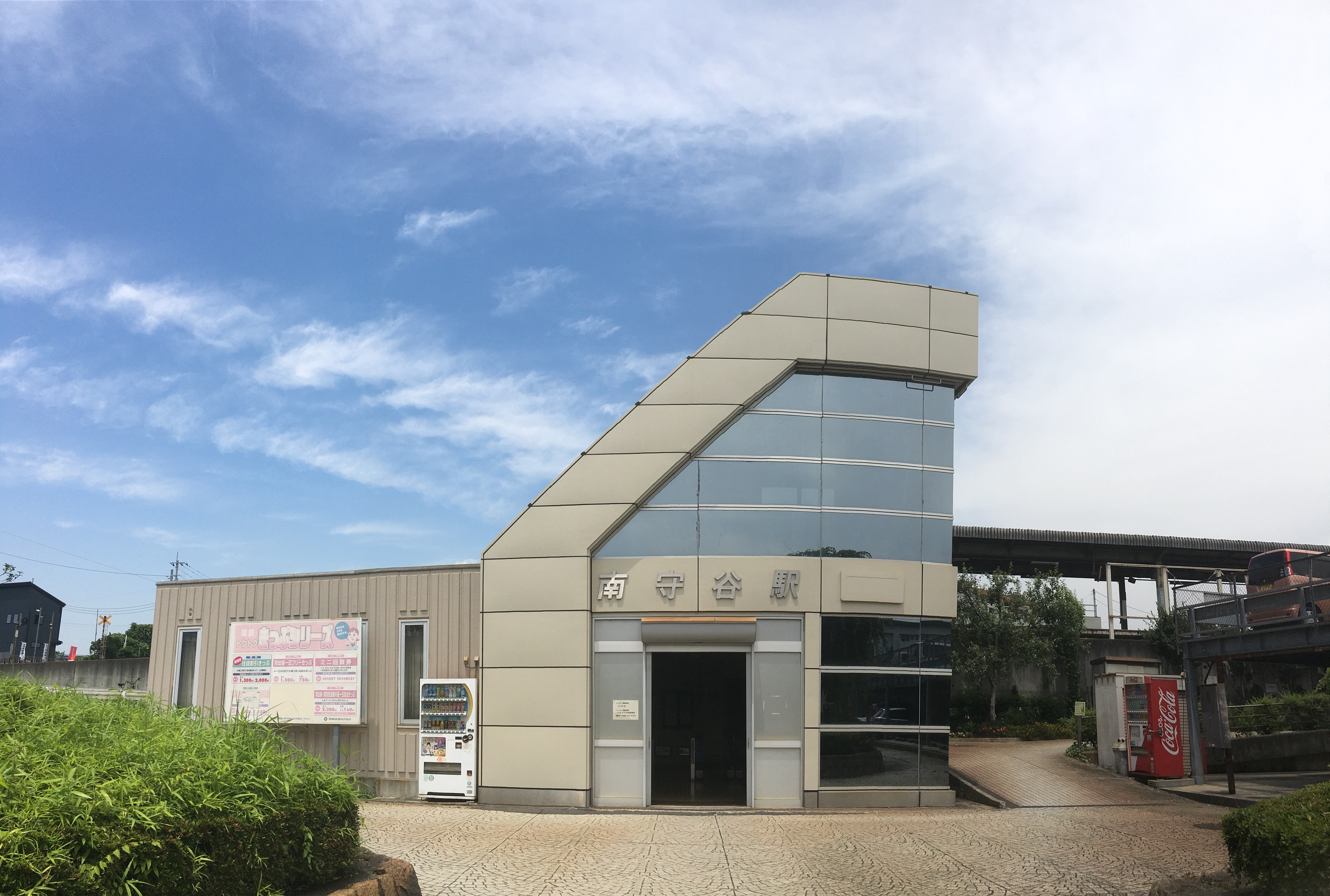 Minami-Moriya Station (南守谷駅)